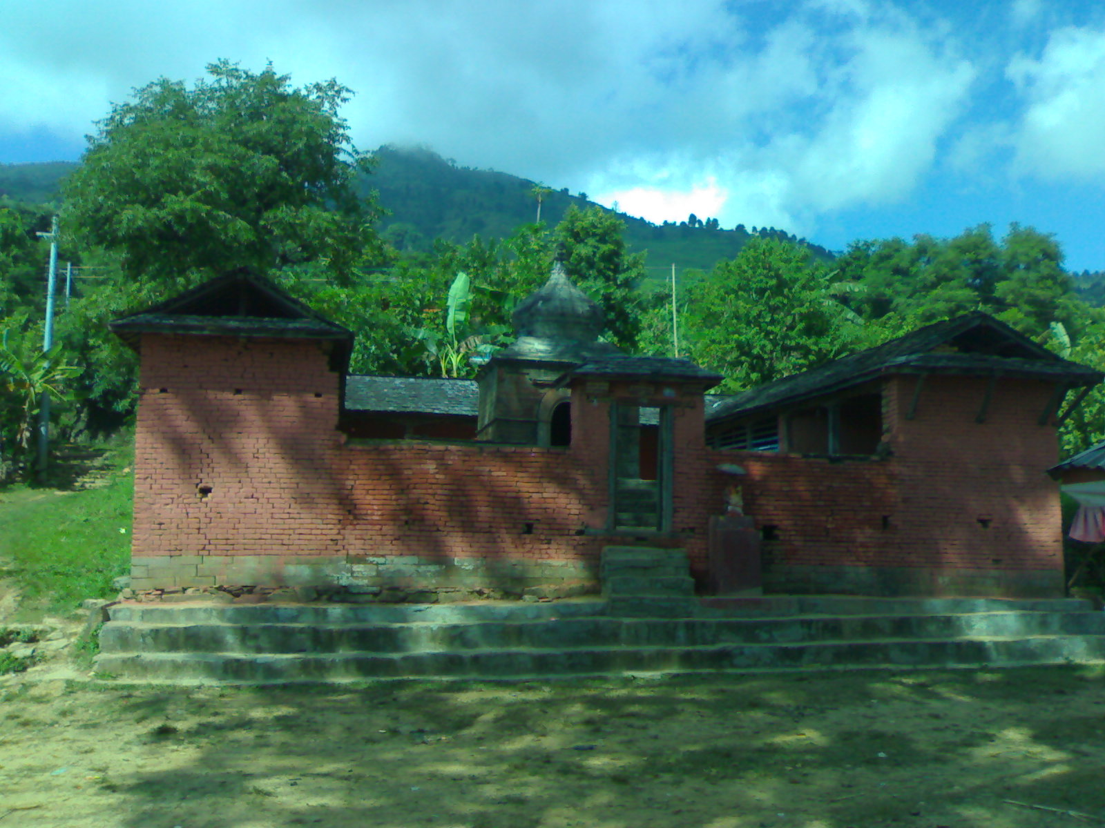 नेपाली: तनहुँको मिर्लुङ गाउँ बिकास समितीको वडा नम्बर ५ कवाचित गाउँमा अबस्थित महालक्ष्मी मन्दिर